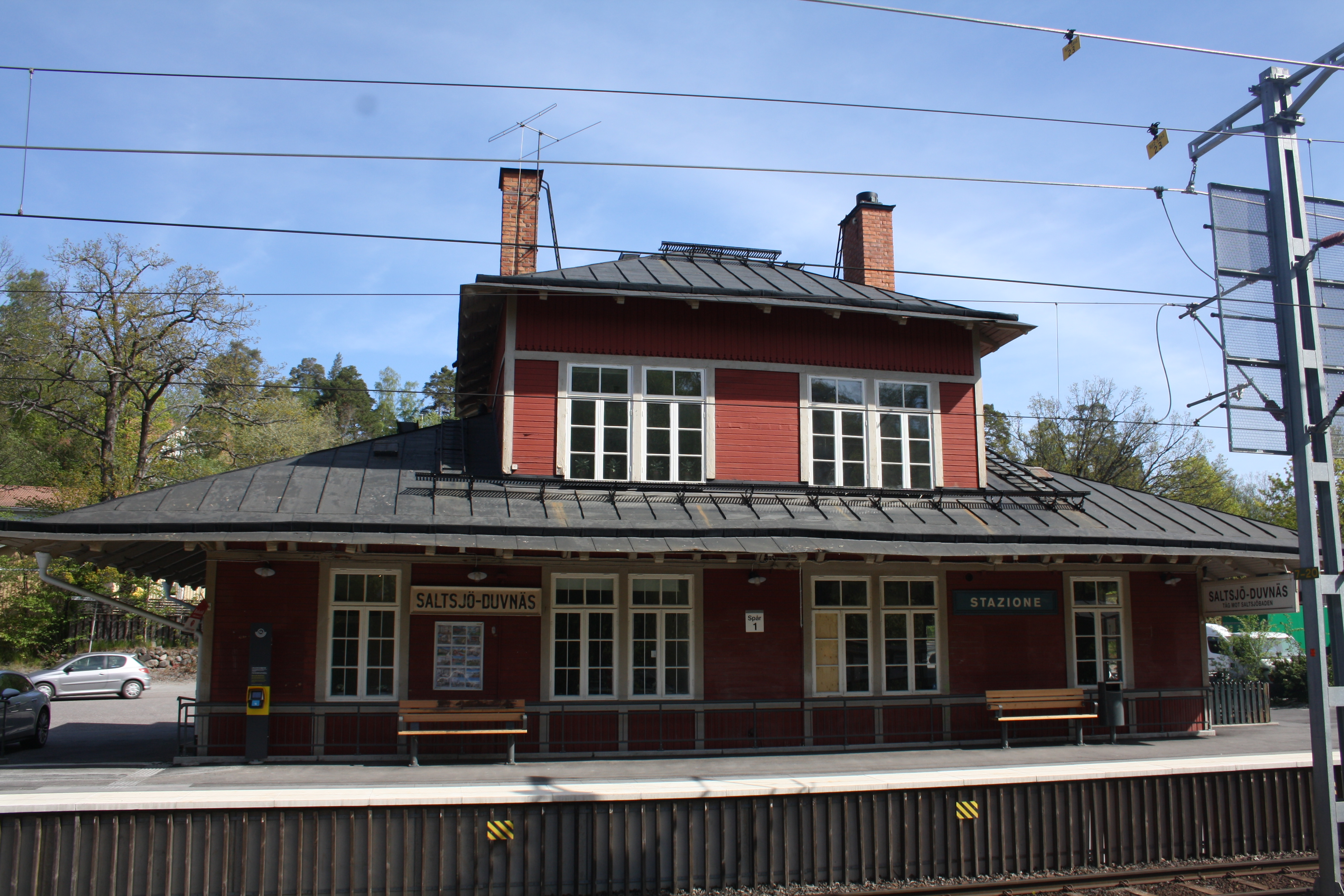 Saltsjö-Duvnäs